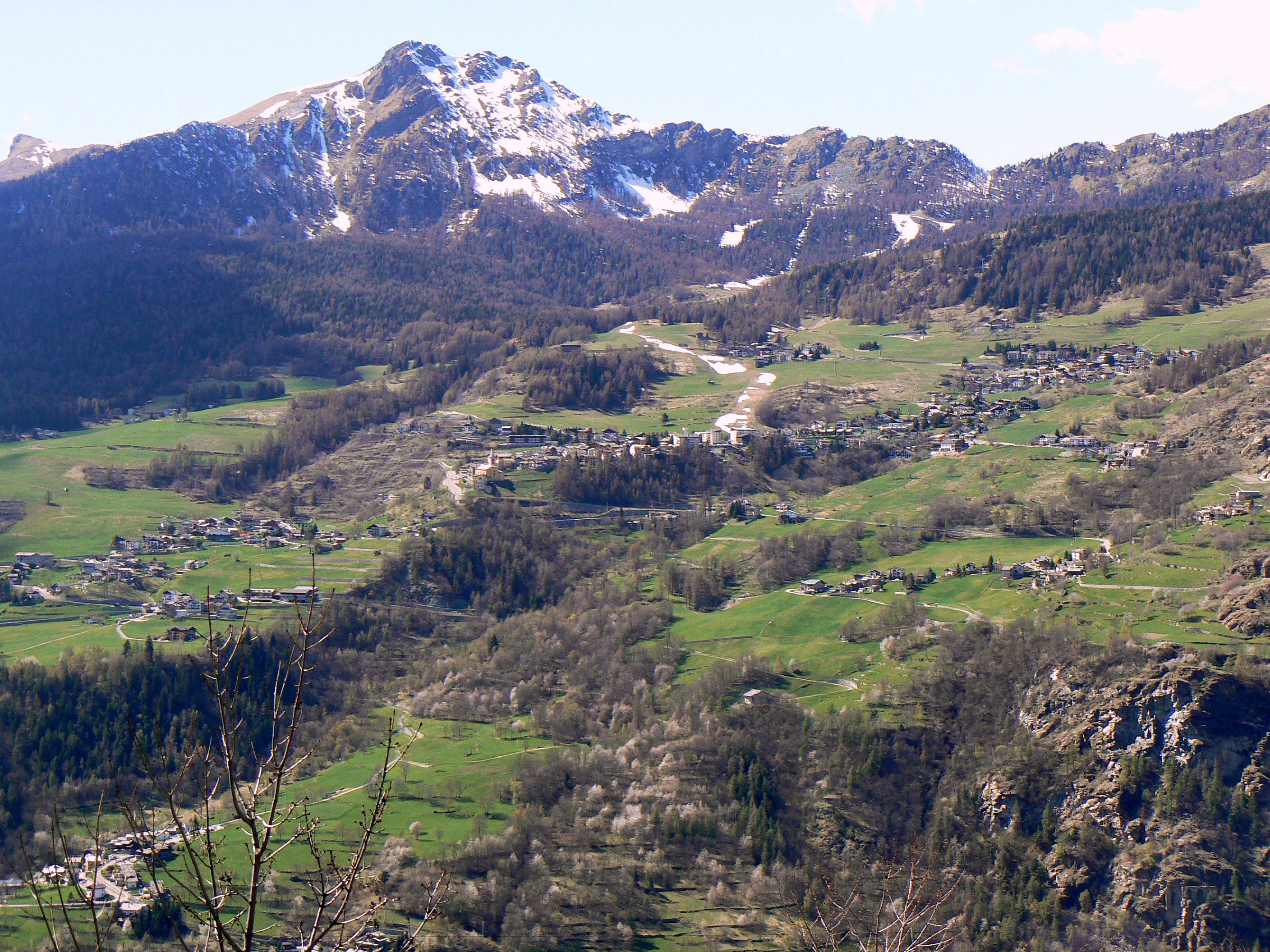 L'abitato di Torgnon